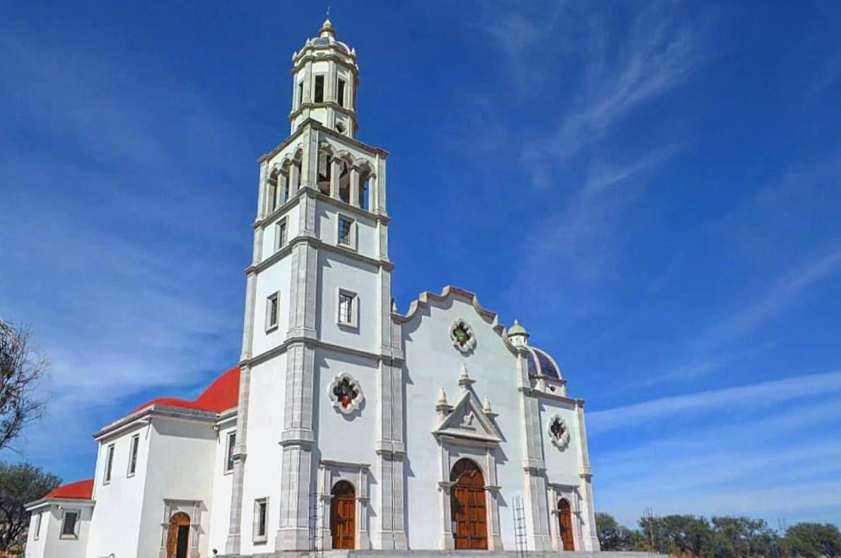 Templo Nuevo en Uriangato